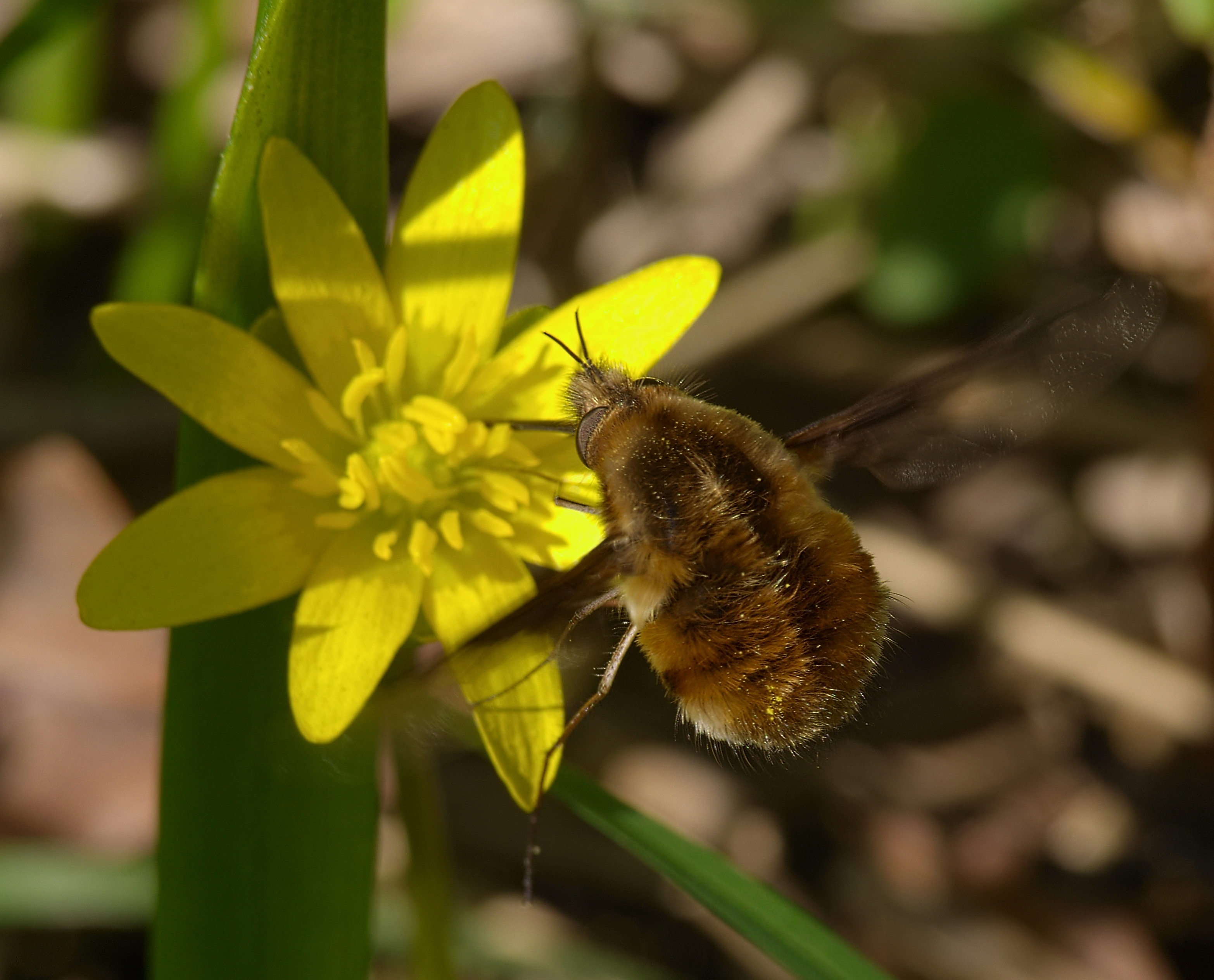 Großer Wollschweber - Bombylius major, fliegend. Aufgenommen im Waldpark in Mannheim-Neckarau, Baden-Württemberg, Deutschland.